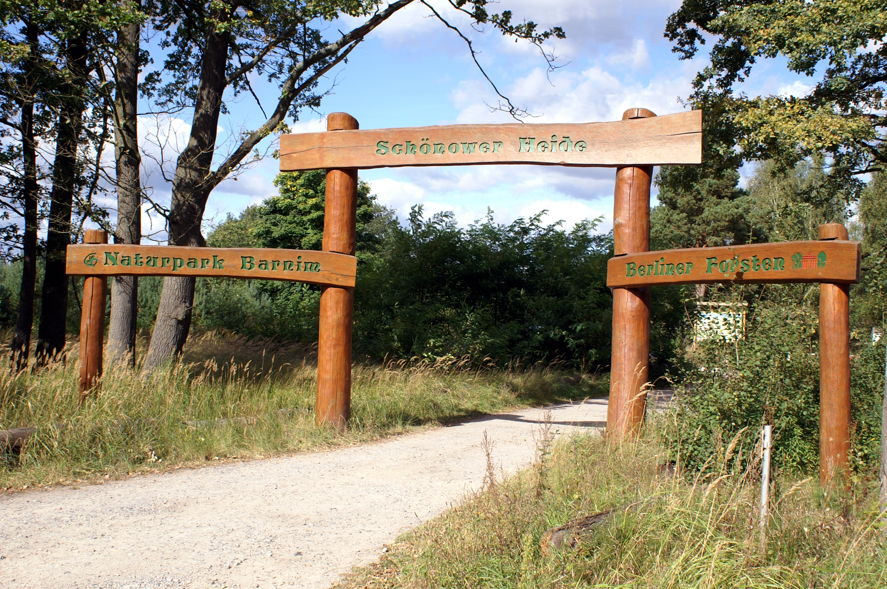 Eingangstor zum Naturschutzgebiet "Schönower Heide"